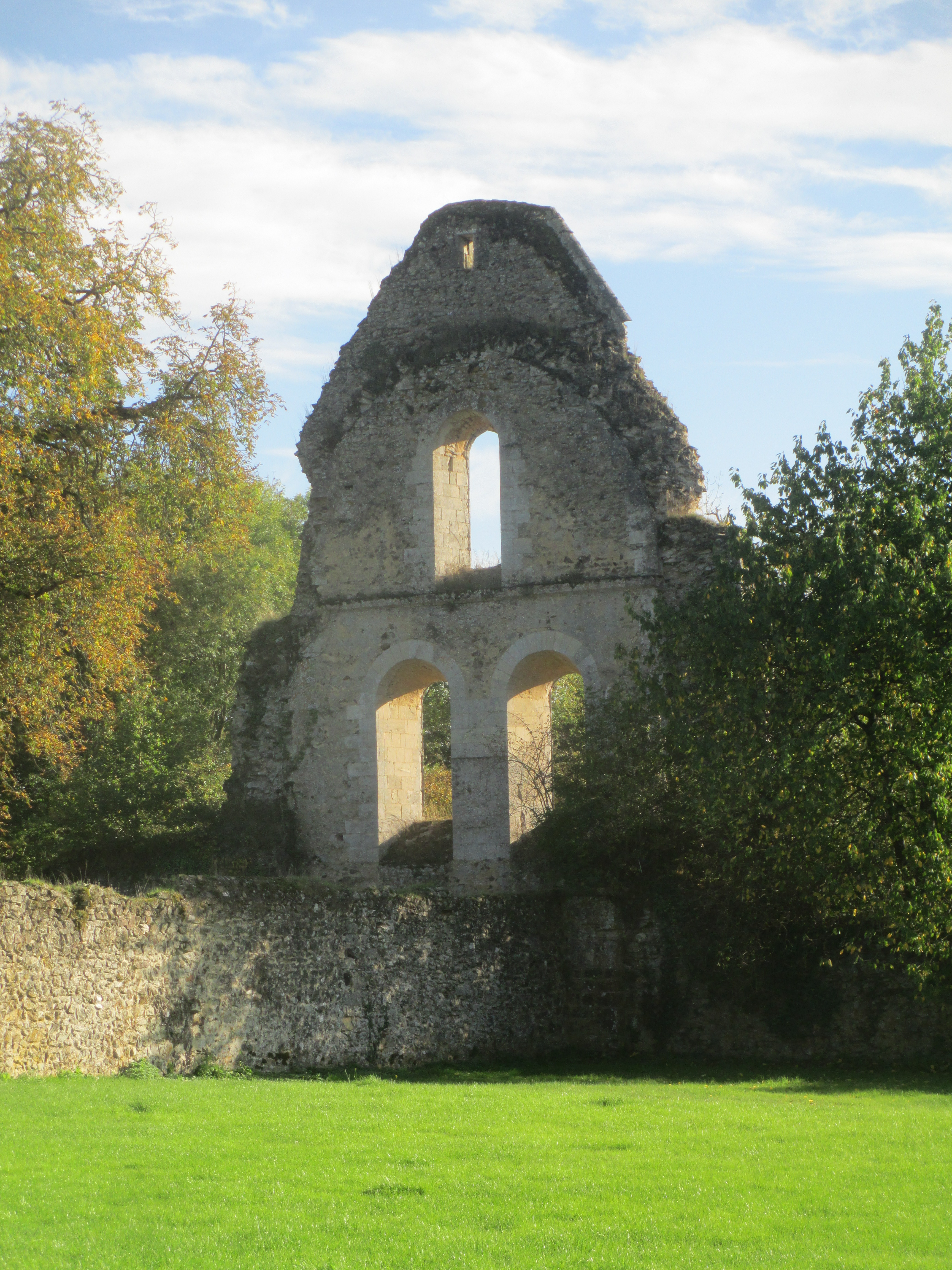 Ruines de l'abbaye de Perseigne, dans la Sarthe.